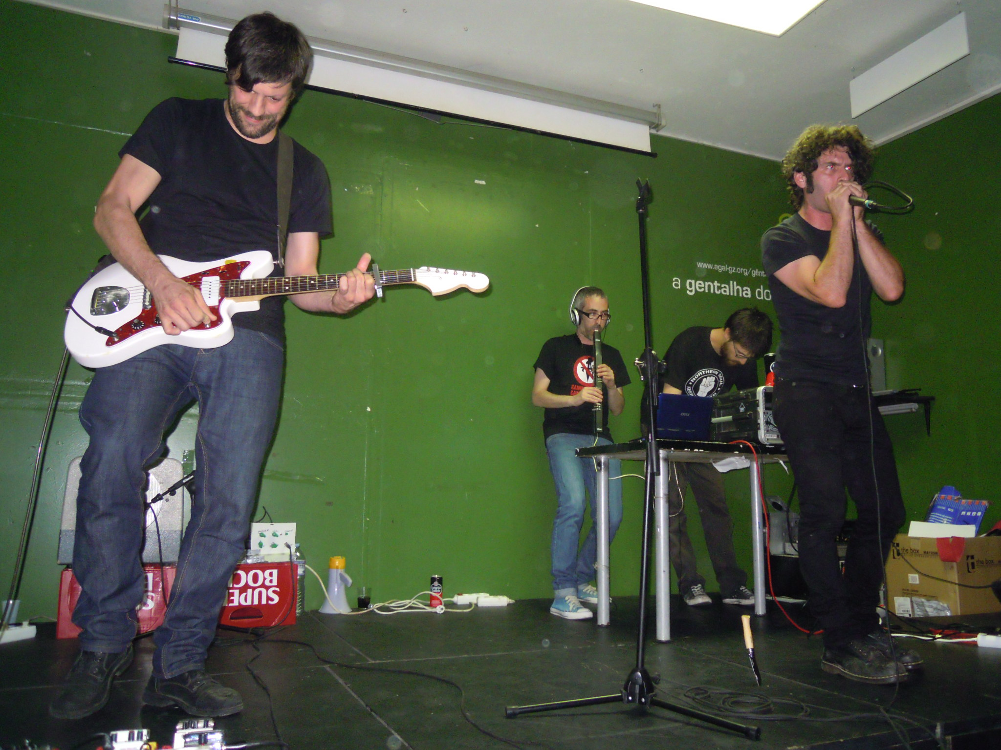 Concerto de Das Kapital na Gentalha do Pichel (Santiago de Compostela)